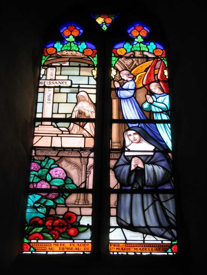 Vitrail représentant Placide Viel dans l'église abbatiale de Saint Sauveur le Vicomte